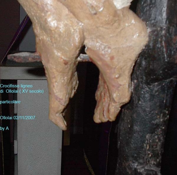 Particolare:il piede destro che poggia su quello sinistro